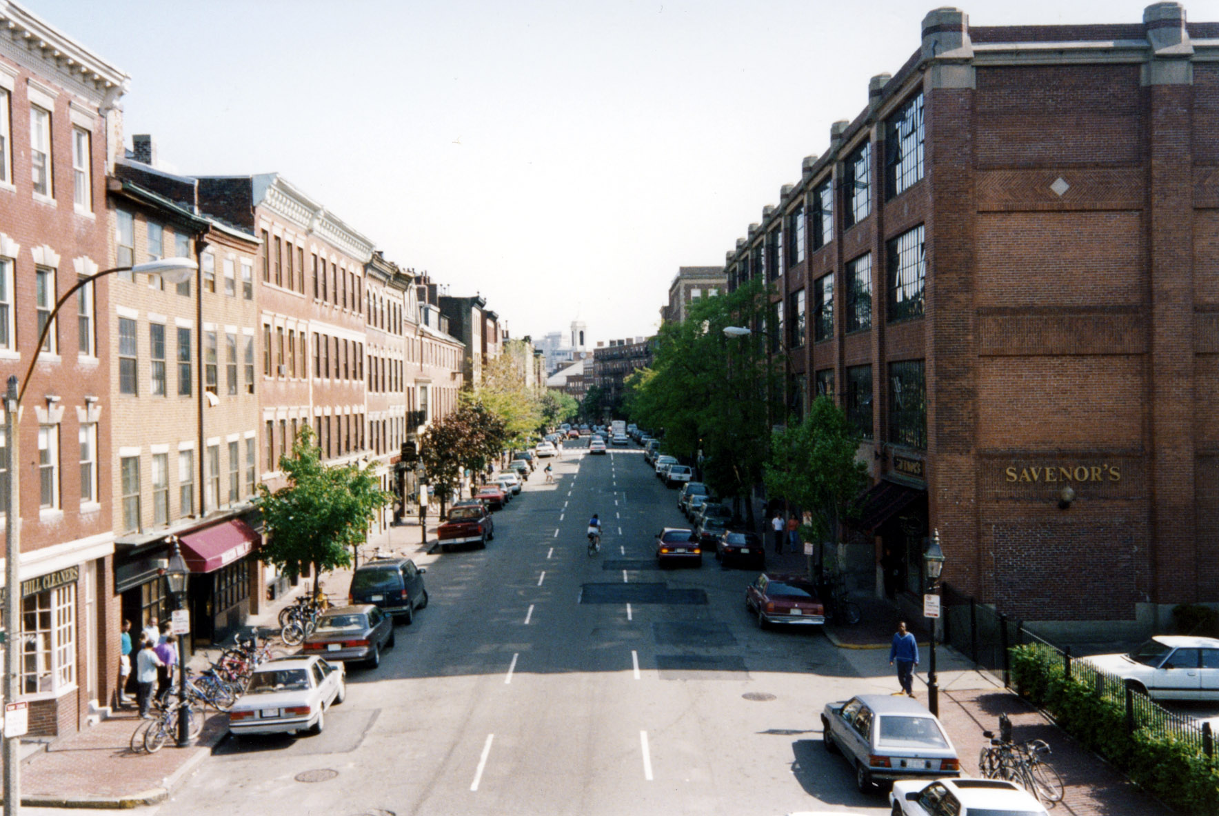 Boston